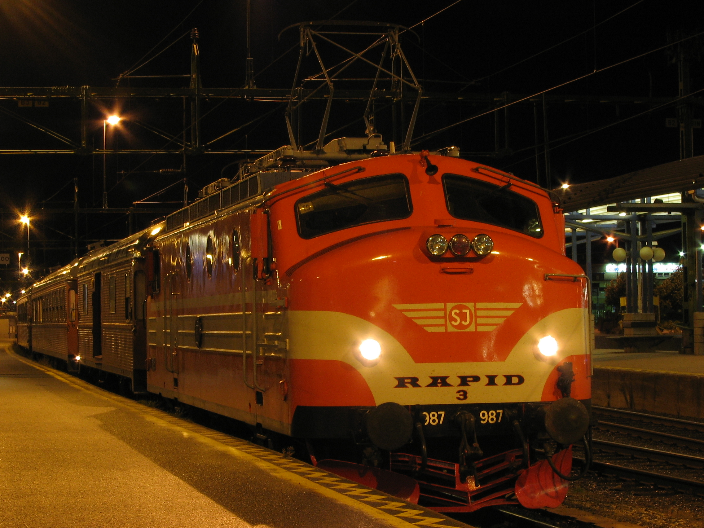 Nässjö Järnvägsmuseums tågsätt på stationen i Nässjö.